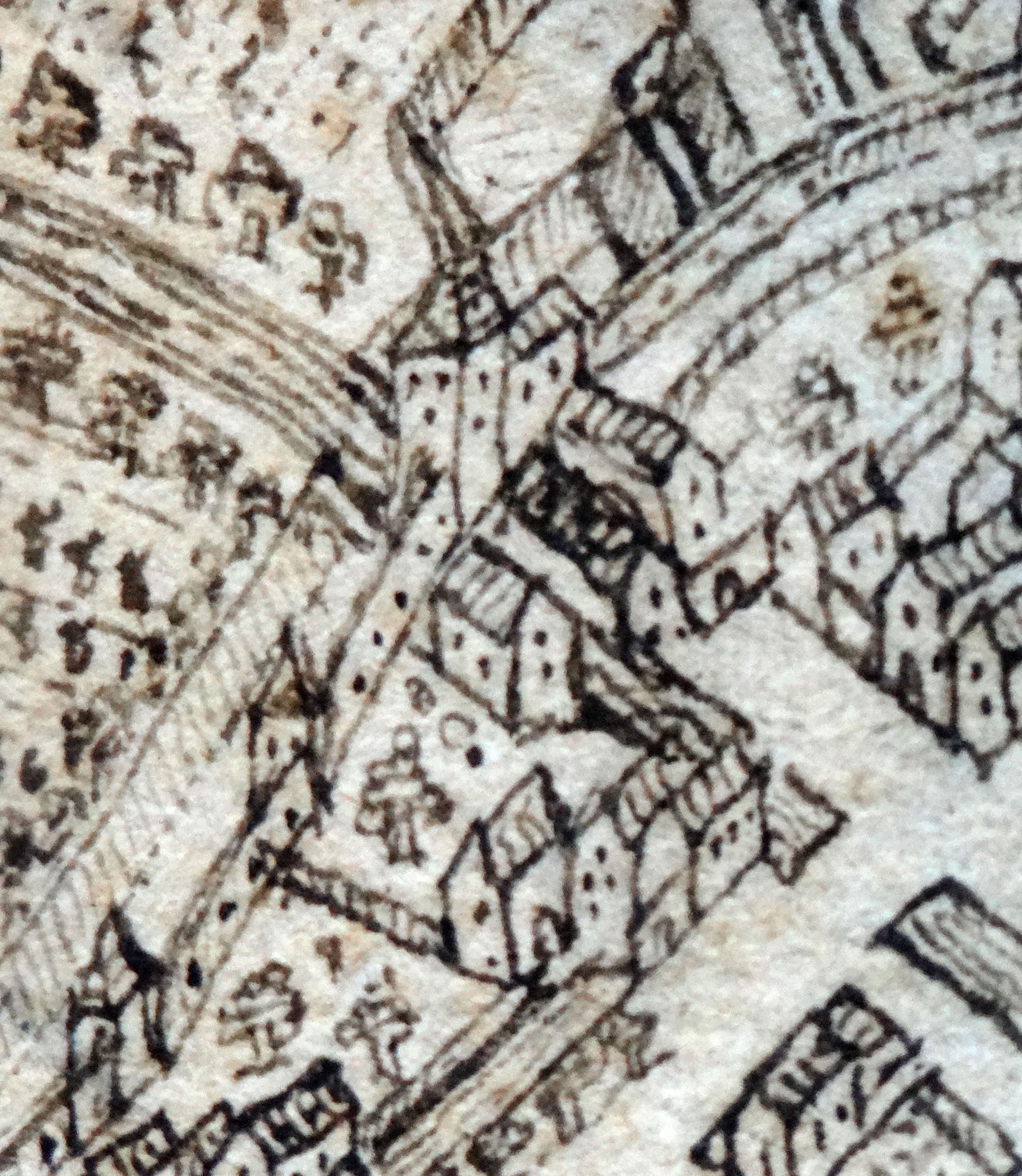 Eisbacheinlass durch die äußere Stadtmauer von Worms. Detail aus: Peter Hamann: Statt Wormbß wie selbige 1631 vor dem Schwedischen Ruin der Vorstätt [...] verblieben. Stadtarchiv Worms, Abt. 1B, Nr. 48.